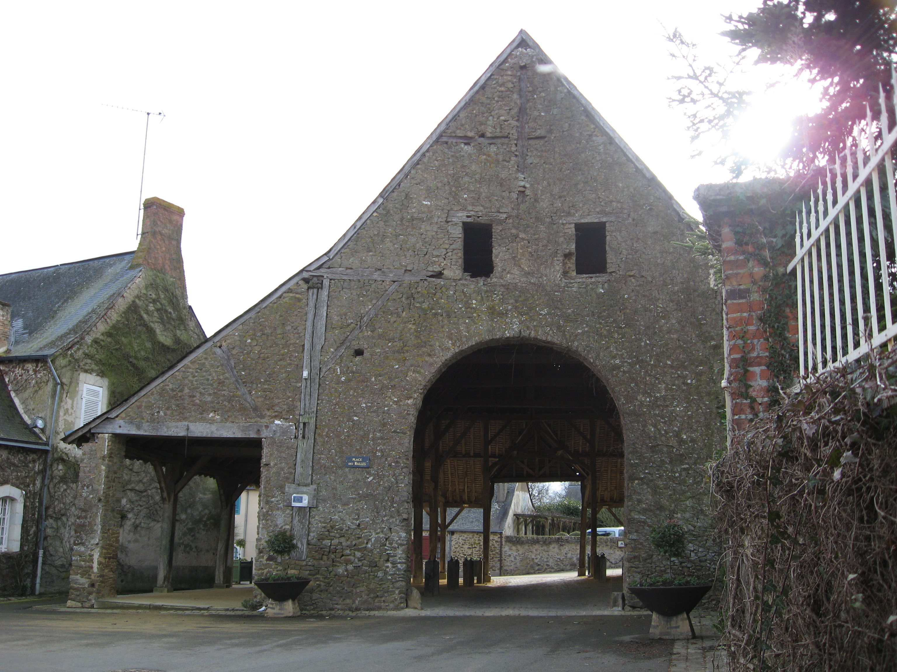 Vue des Halles ("Les Halles") du Moyen-Äge de Saint-Denis-d'Anjou, Département de la Mayenne (n° de département : 53), France